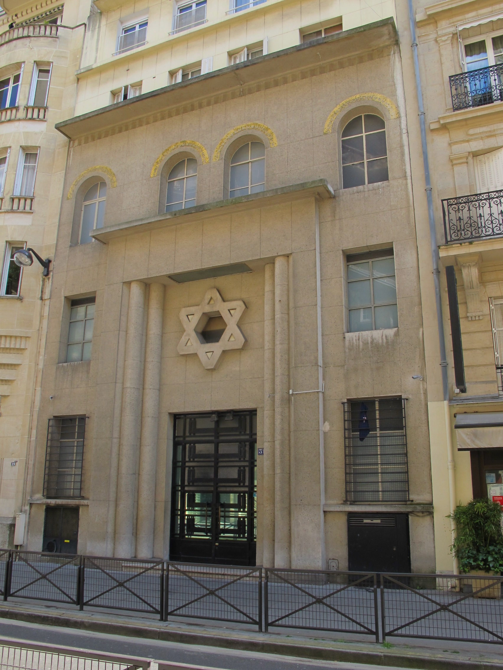 Synagogue de la rue de Montevideo, Paris